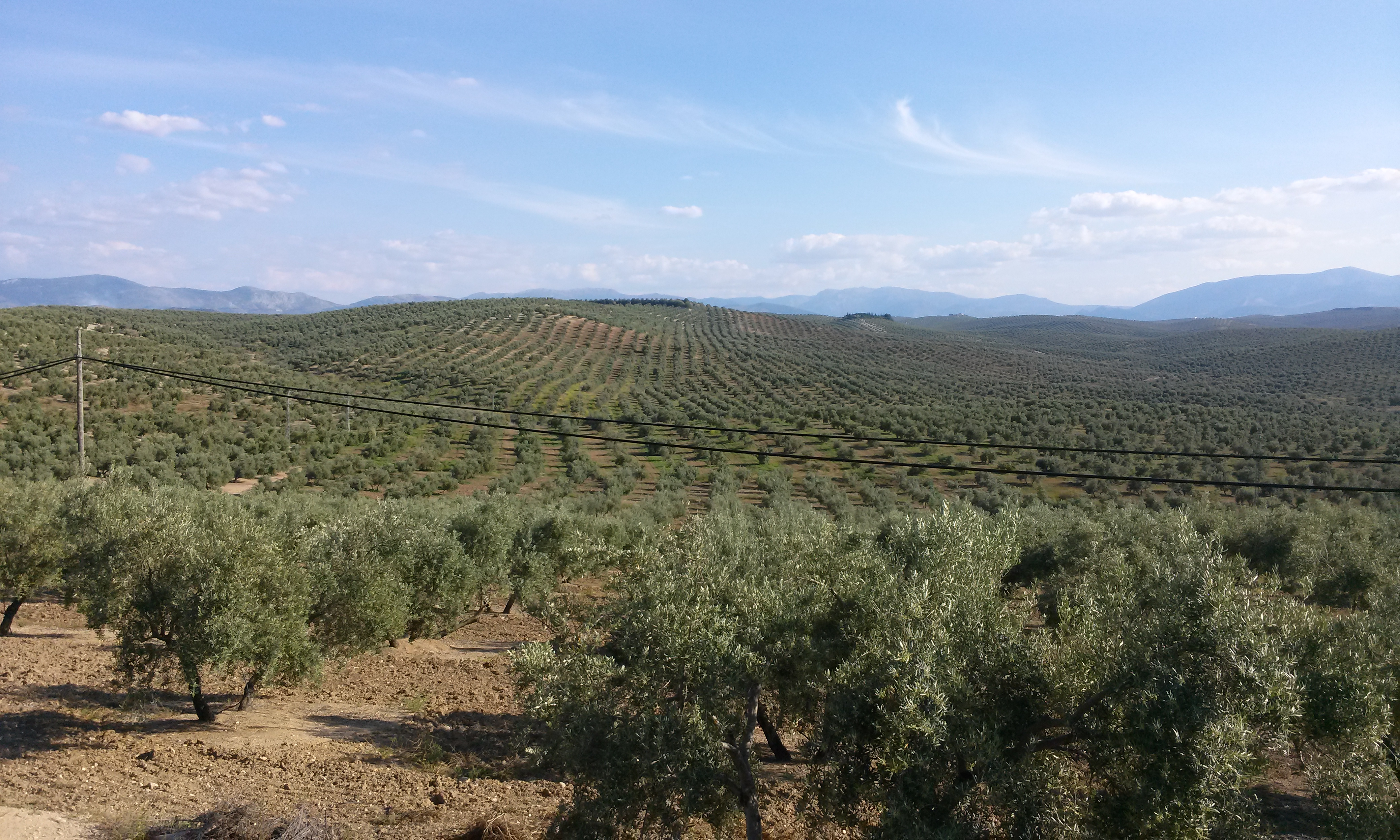 Panorama de olivares junto a Villargordo.